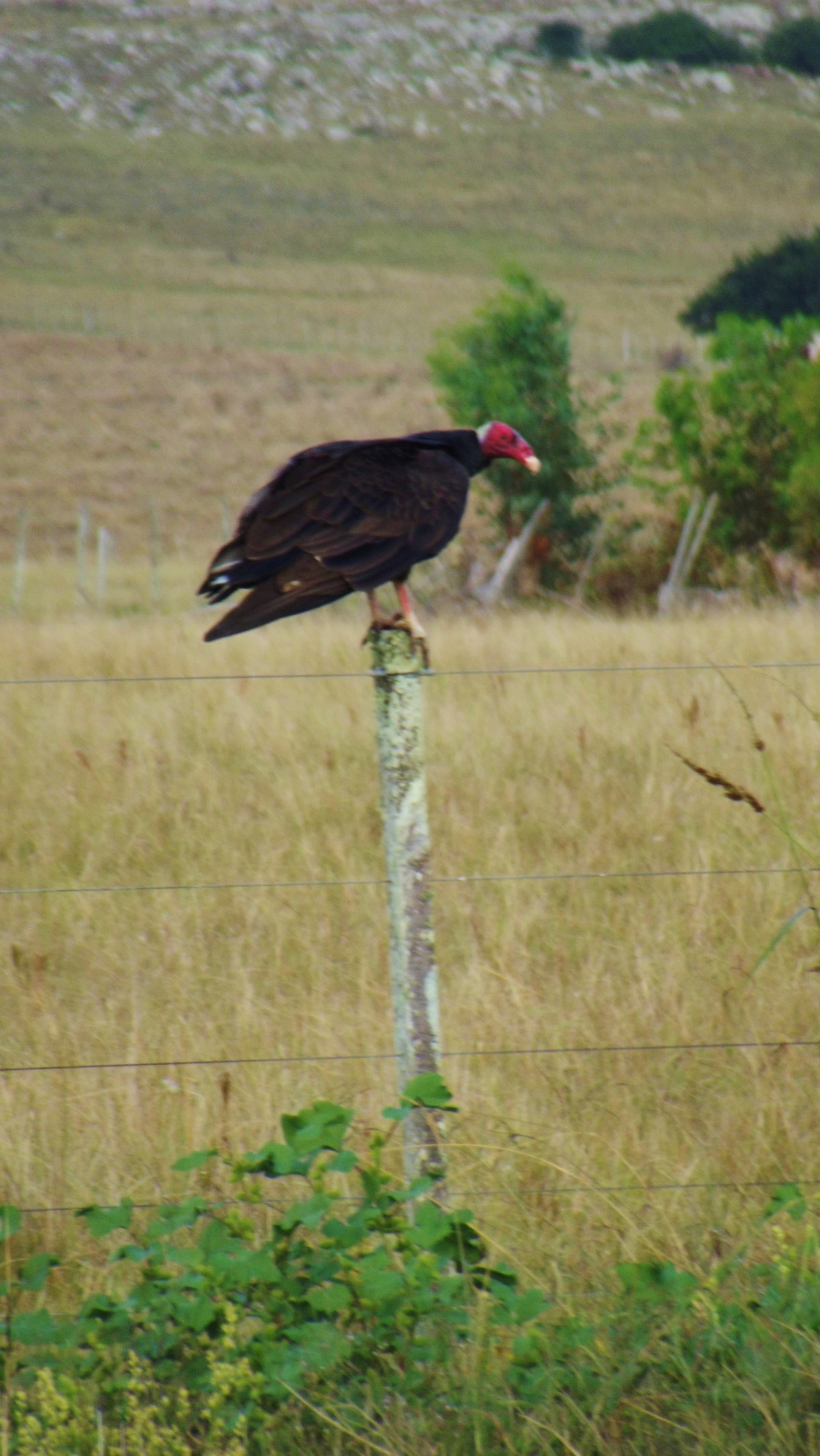 Camino a la quebrada